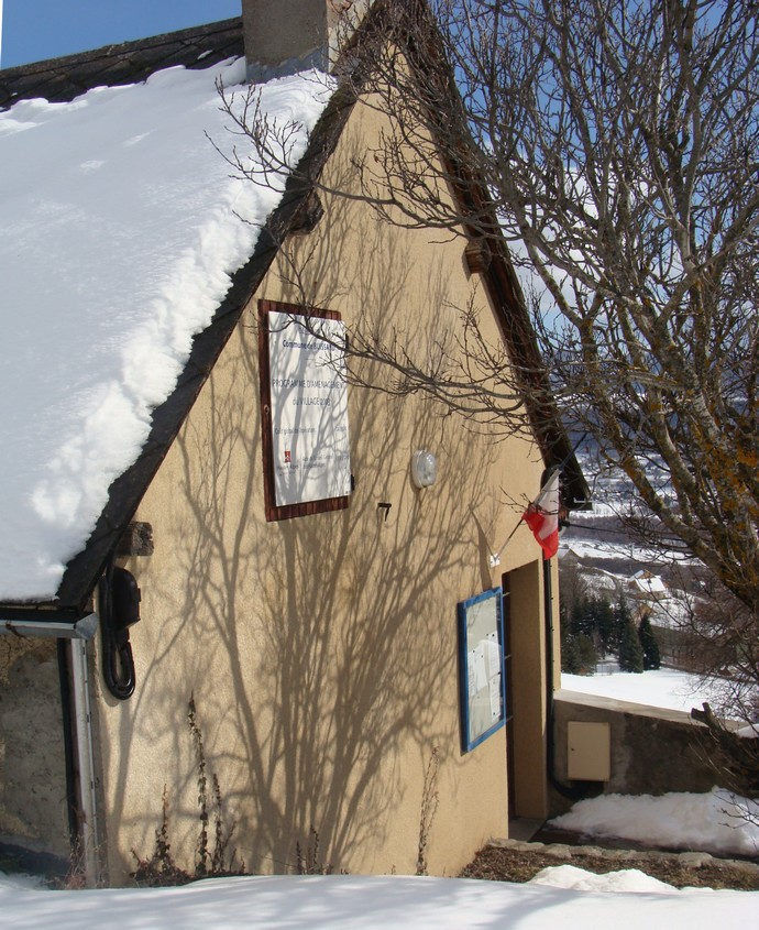 La mairie de la commune de Buissard (Hautes-Alpes), située au hameau de Rissents.